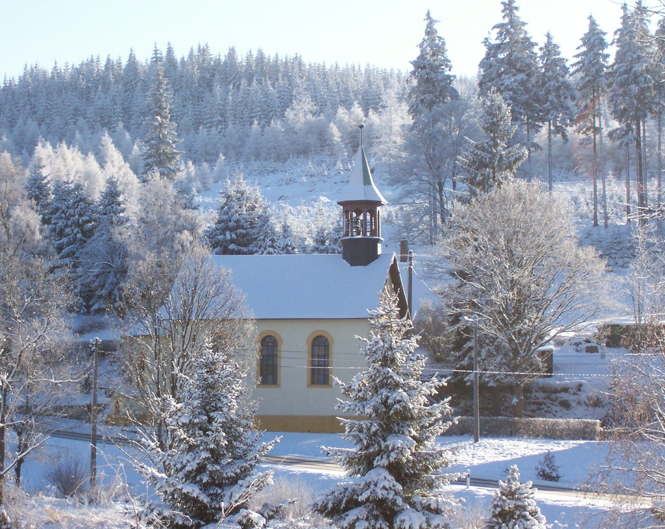 Kostel sv. Antonína z Padovy v malebném údolí Černého Potoka